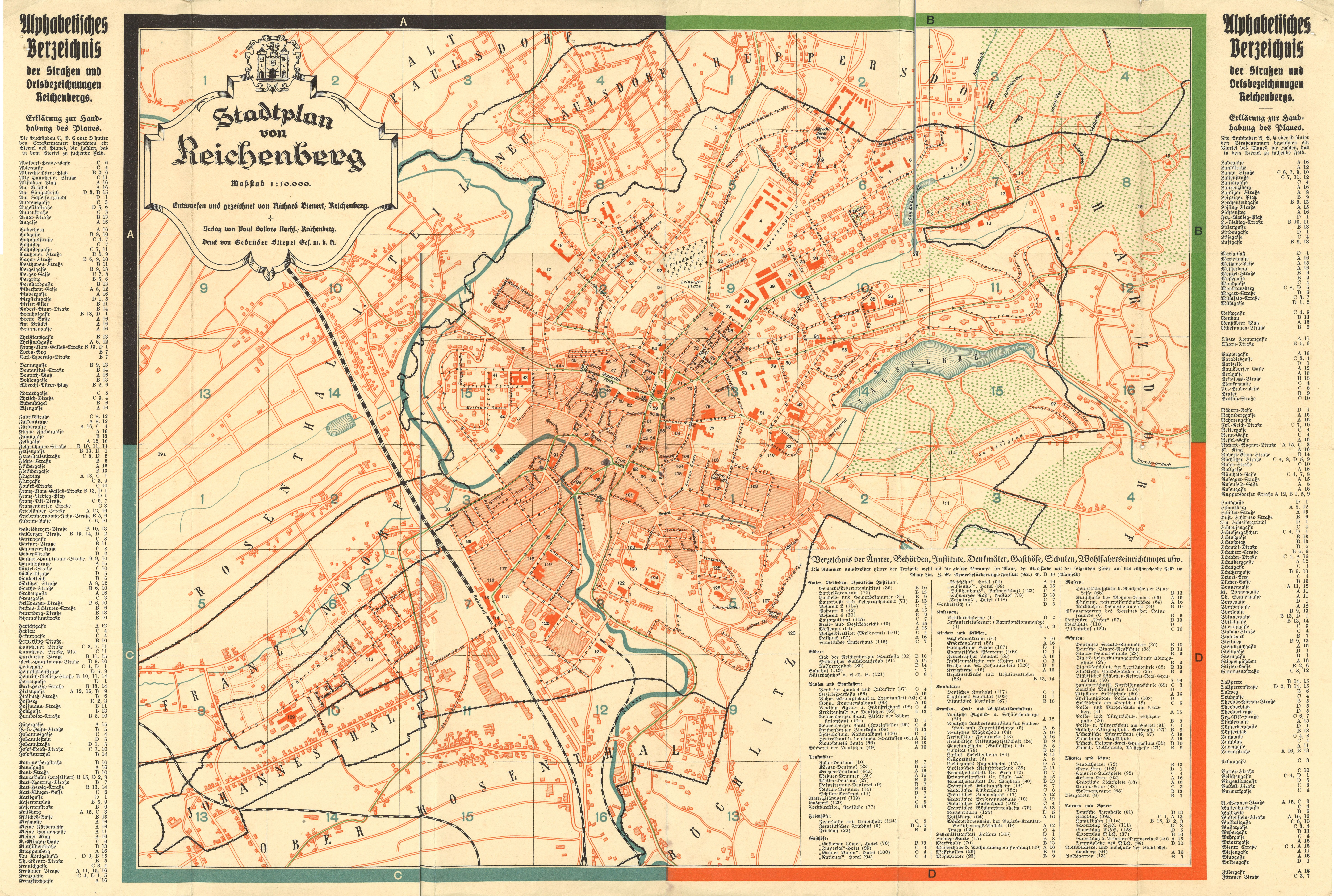 Plán Liberce z let min. 1929 max. 1932 (datováno názvy ulic a tramvajovými tratěmi)